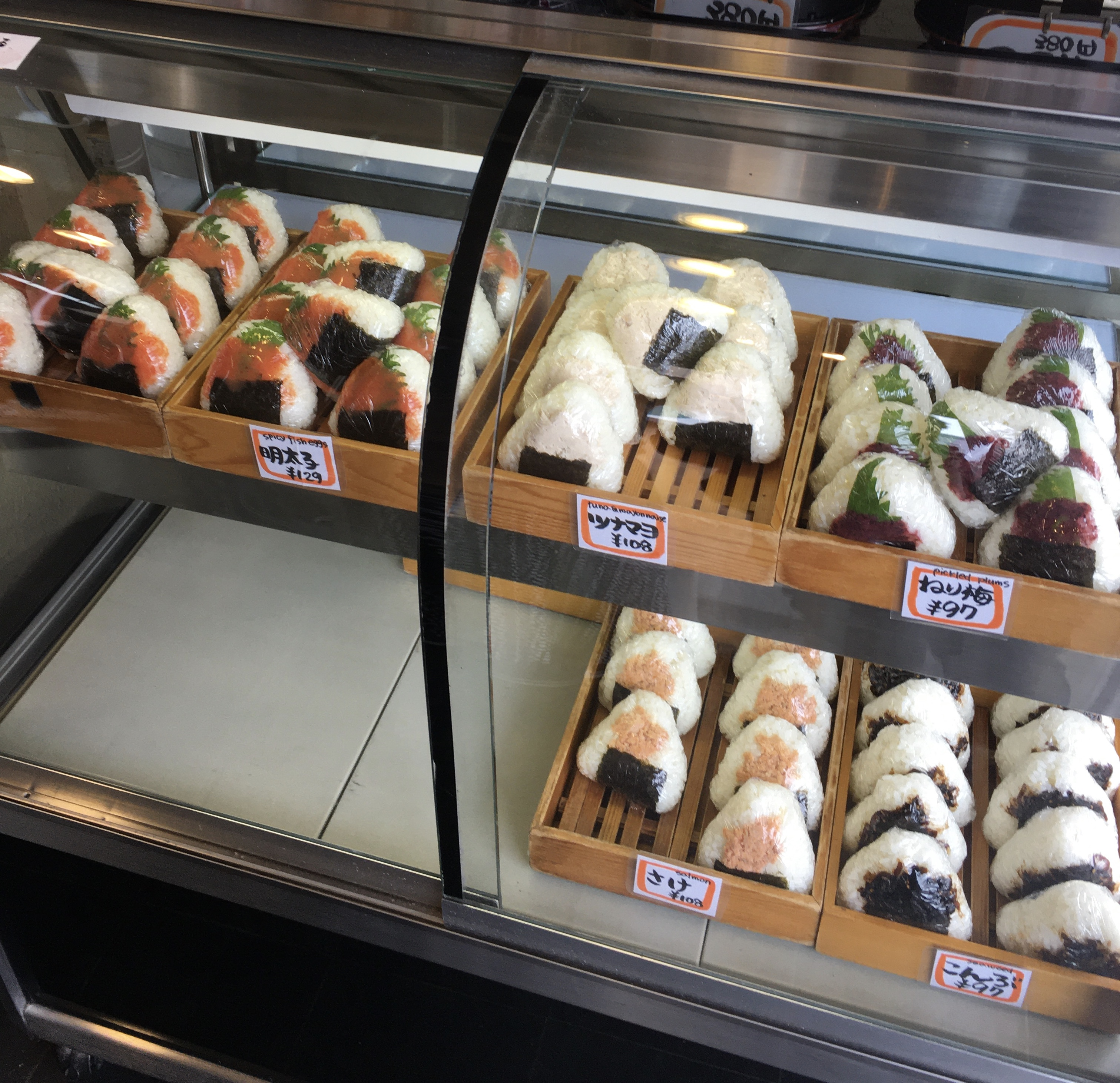 京都市中京区のおにぎり (Onigiri in Kyoto)